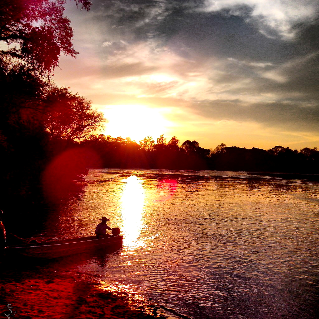 Por do sol a beira do rio Jacuí no município de Agudo, interior do Rio Grande do Sul, Brasil.